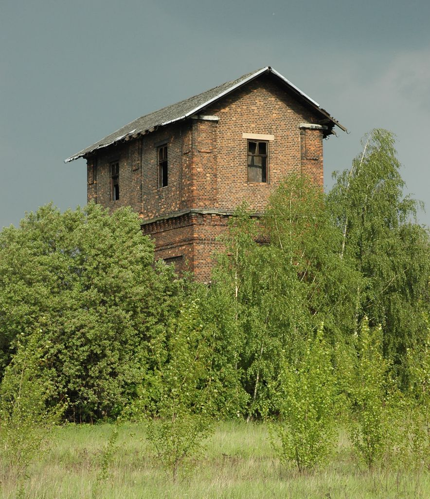 Vodárenská věž v bývalém depu Báňské dráhy, Ostrava